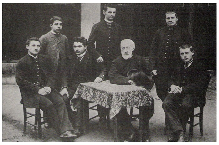 Charles Péguy en classe de philosophie au lycée d’Orléans (Lycée Pothier) en 1890-1891 (assis à droite), photographe inconnu.